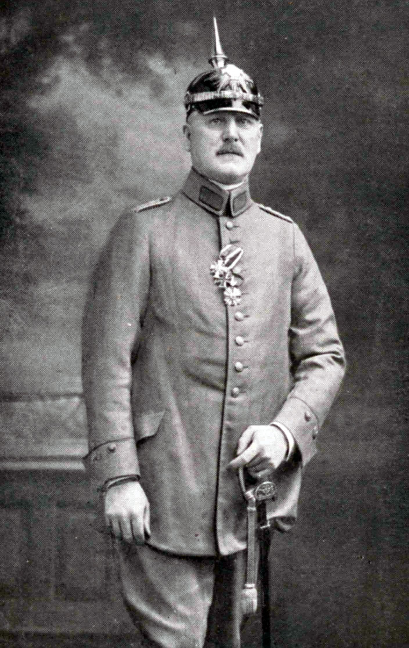 Fotografie von Alexander Pagenstecher als Offizier der Preußischen Armee